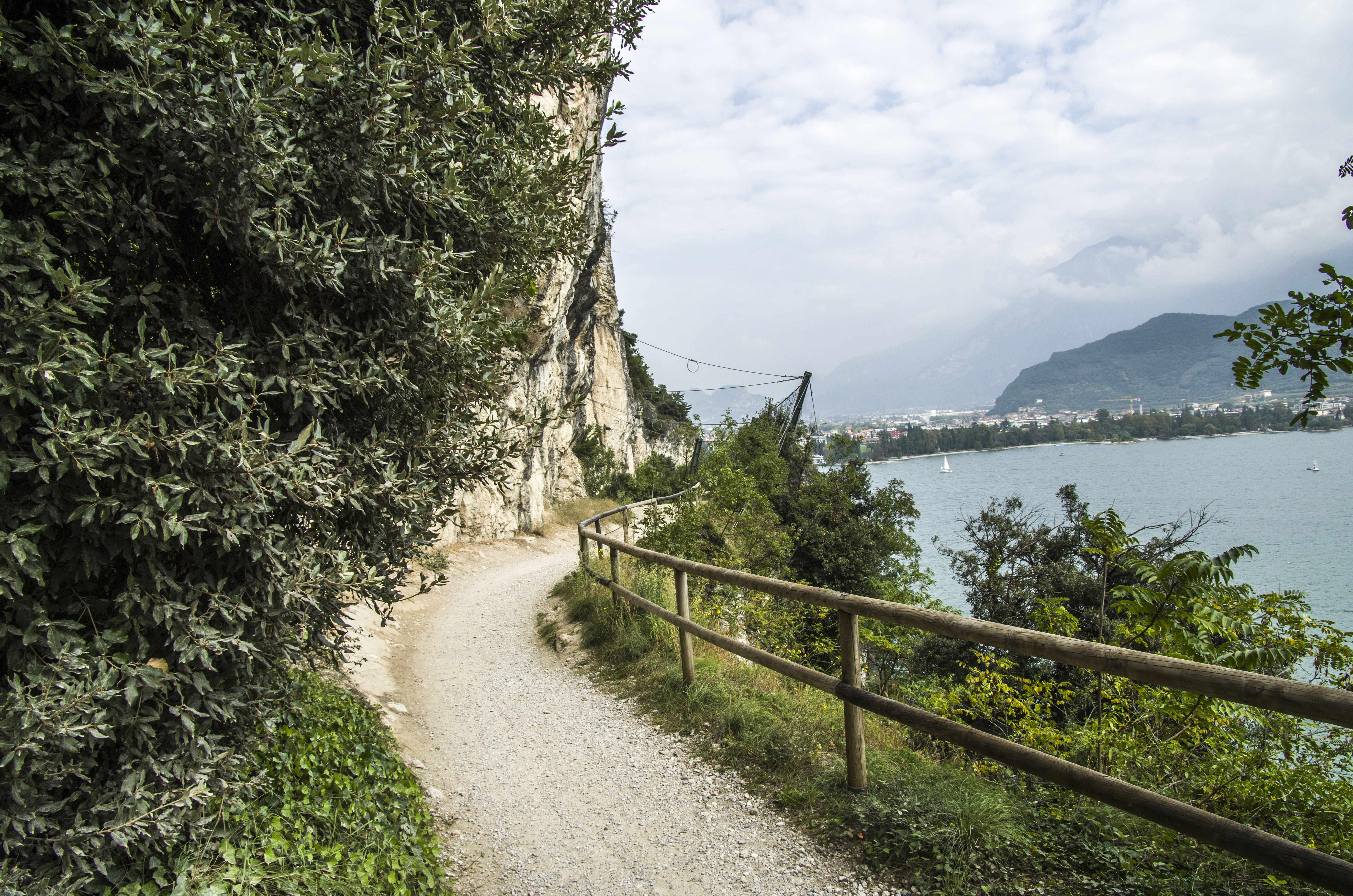 bike path near Garda lake